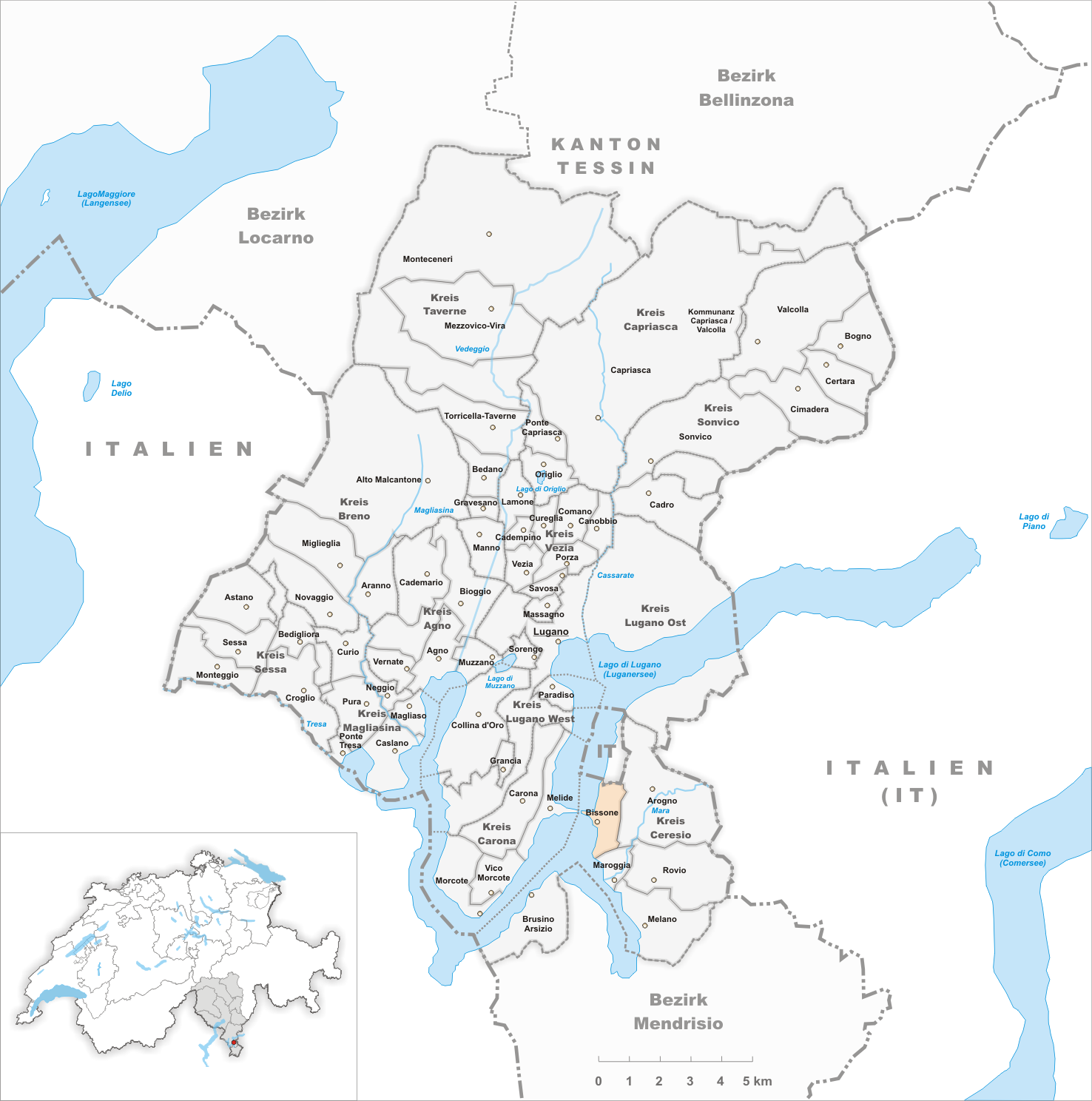 Municipality Bissone